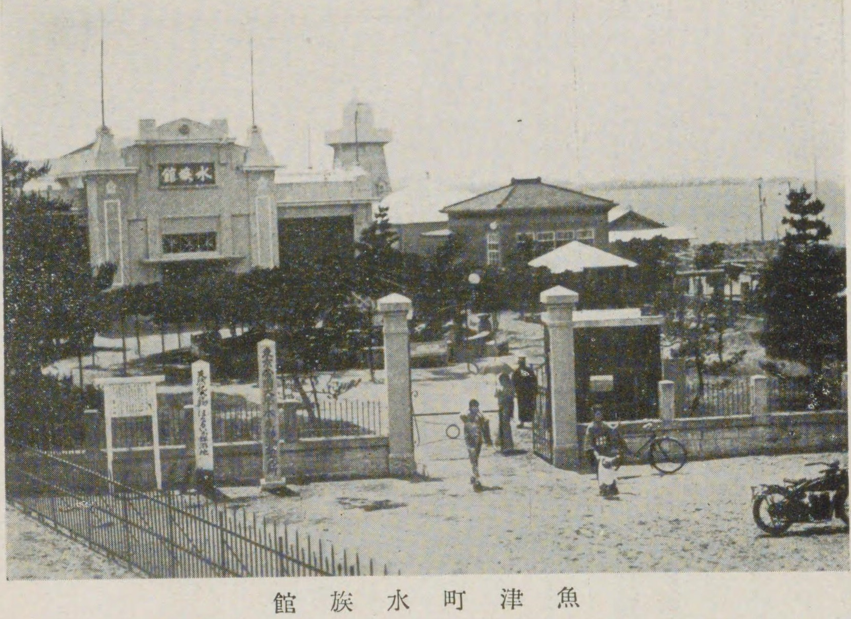 1913年（大正2年）開館の魚津水族館の戦前の様子